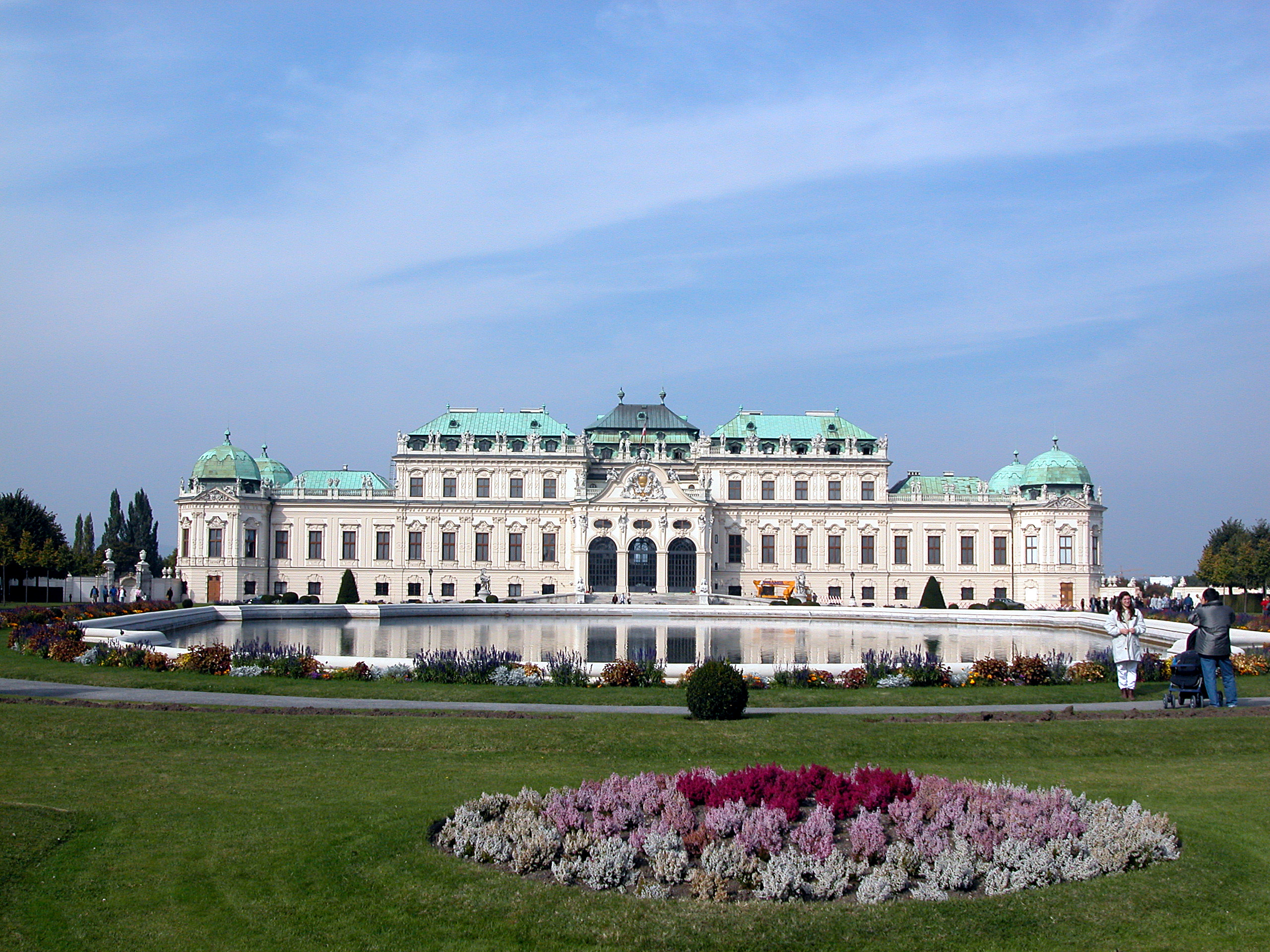 Das Schloss Belvedere Source: Alexander Umbricht, 2. Okt. 2002